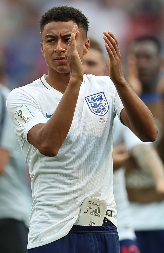 Сборная Англии сокрушила Панаму, Кейн оформил хет-трик